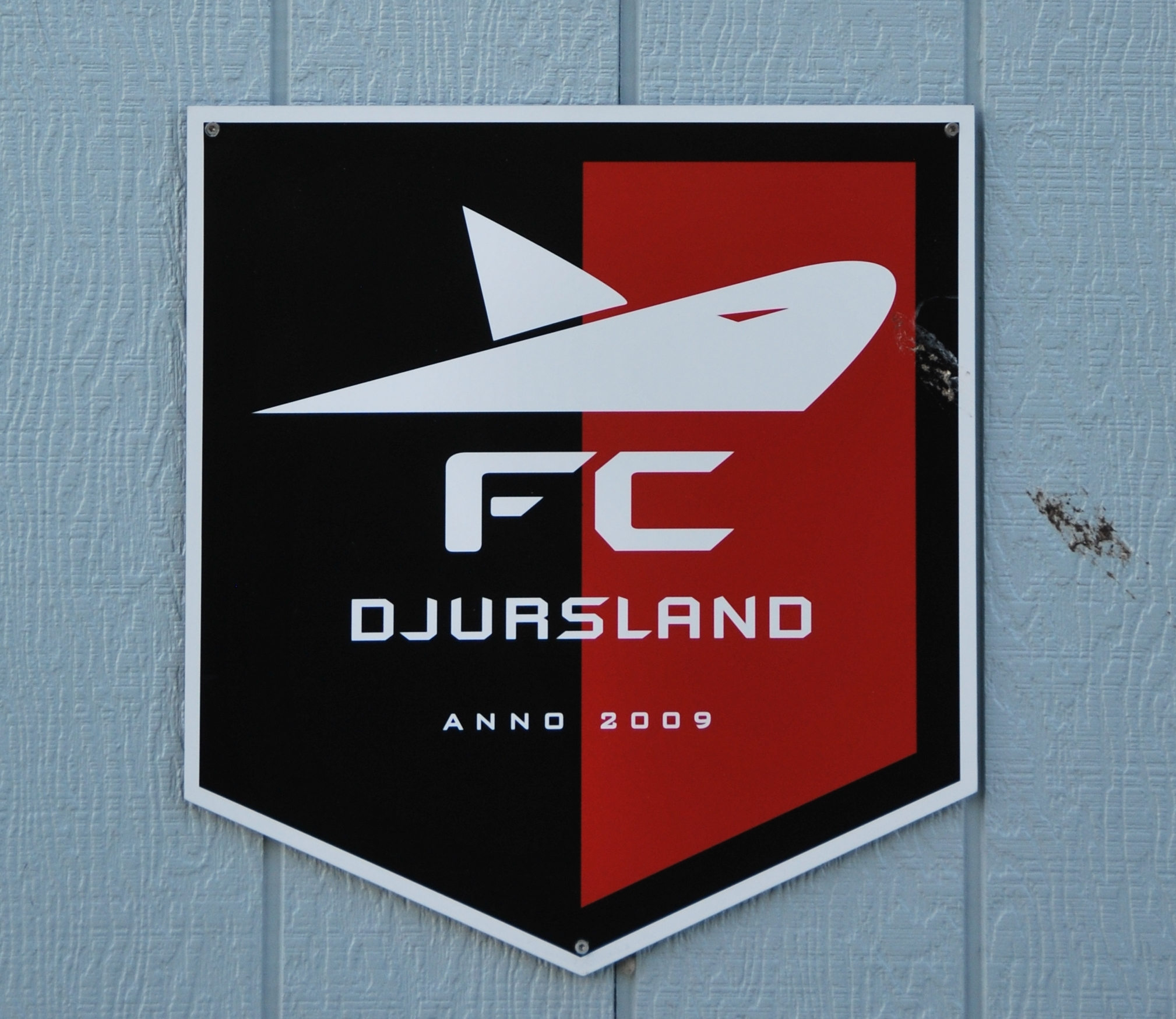 Skilt med FC Djurslands logo.